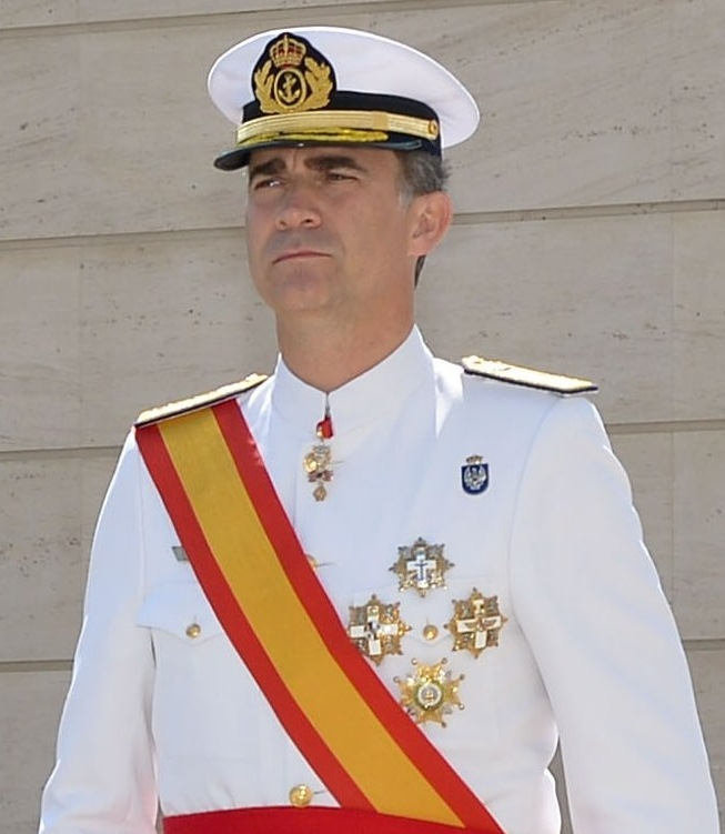 14.07.11-Escuela Marina-1-San Fernando